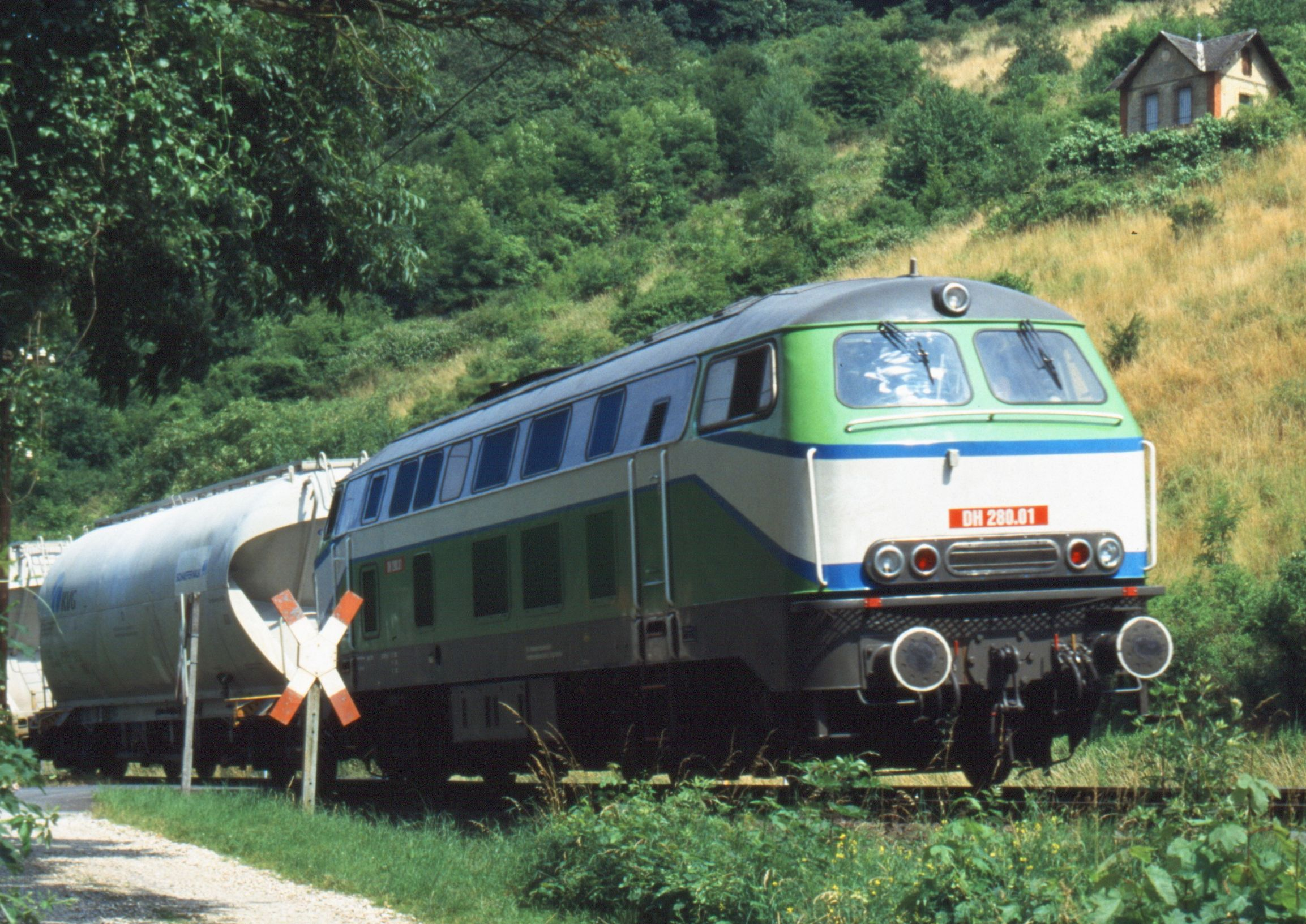 Die DH 280.01 im Kalkverkehr, aufgenommen zwischen Stromberg und Schweppenhausen, Ortsausgang Stromberg